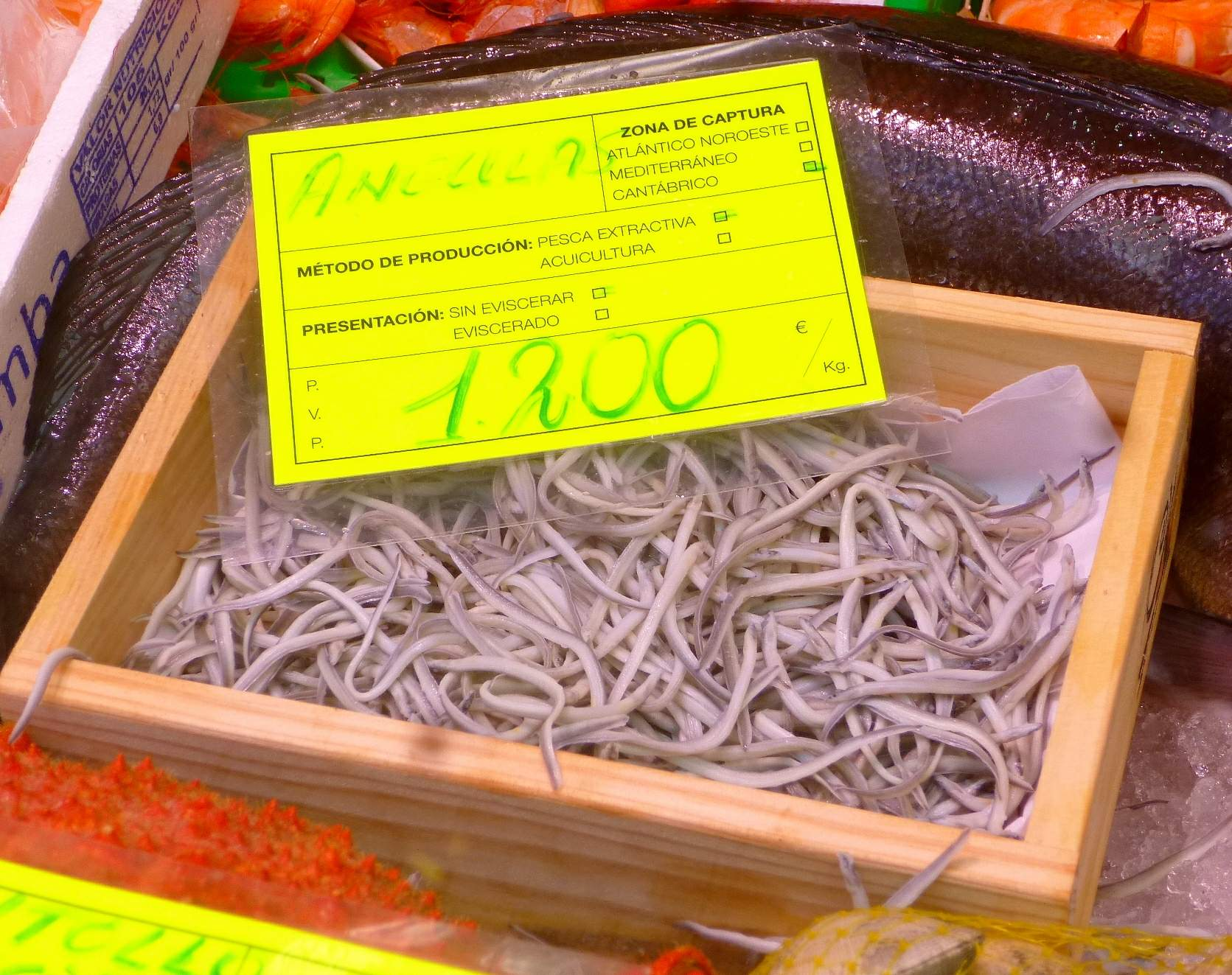 Muestrario de angulas a 1.200 euros el kilo en Pescaderías Vascas, en la calle Astarloa de Bilbao. Imagen tomada el 17 de febrero de 2018.